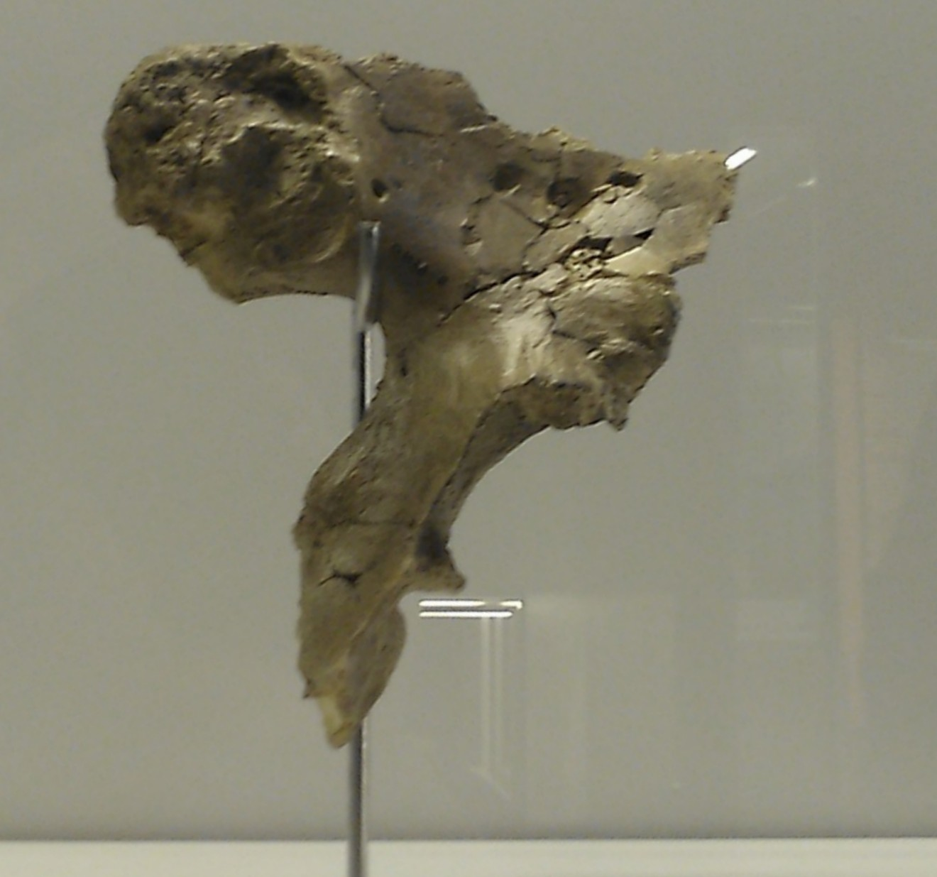 Réplica de la cadera OH 28 de Homo erectus (u Homo ergaster). Exposición "La cuna de la humanidad", Alcalá de Henares, Madrid (España).